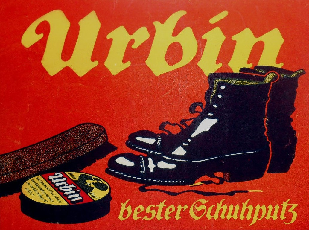 Hans Lindenstaedt: Urbin, bester Schuhputz, 1905, Werbekleinplakat, Druck: Reklamekunst Charlottenburg 4, ca. 29 cm x 21 cm